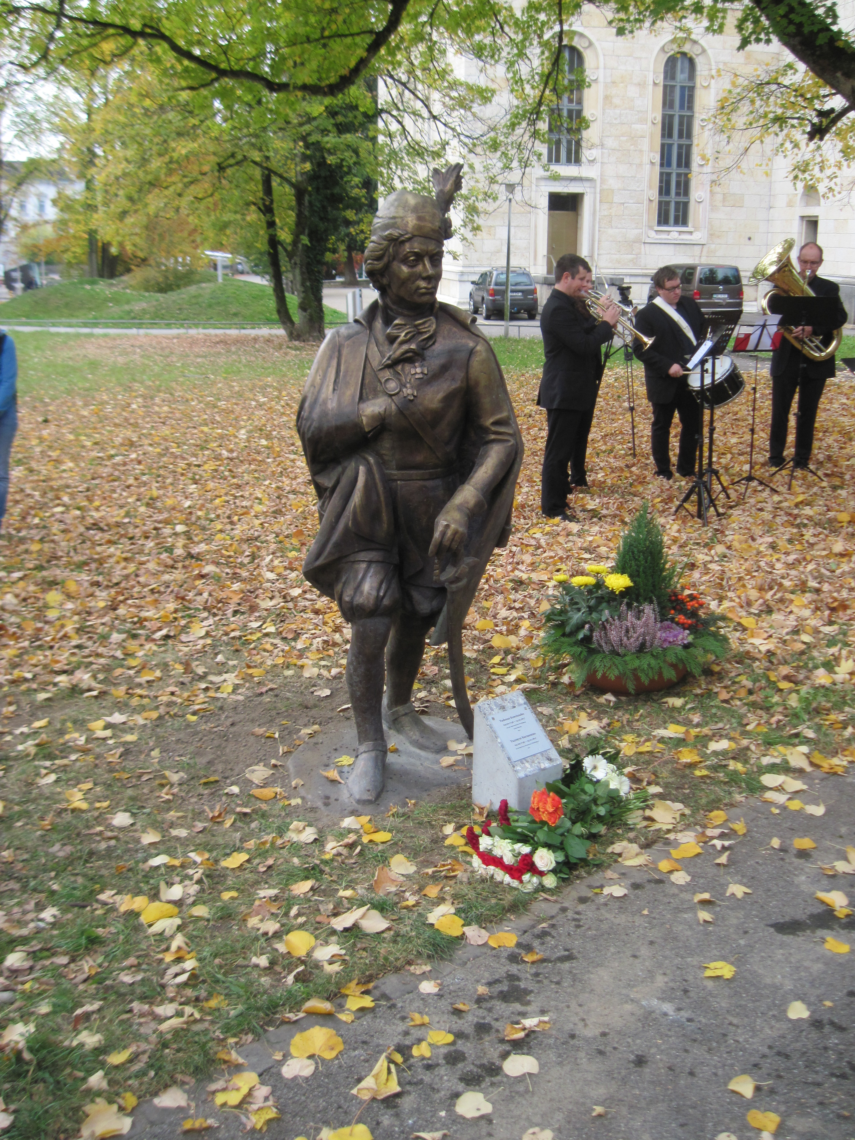 Беларуская (тарашкевіца): Помнік Тадэвушу Касьцюшку ў Залятурне ў дзень адкрыцьця (21/10/2017)